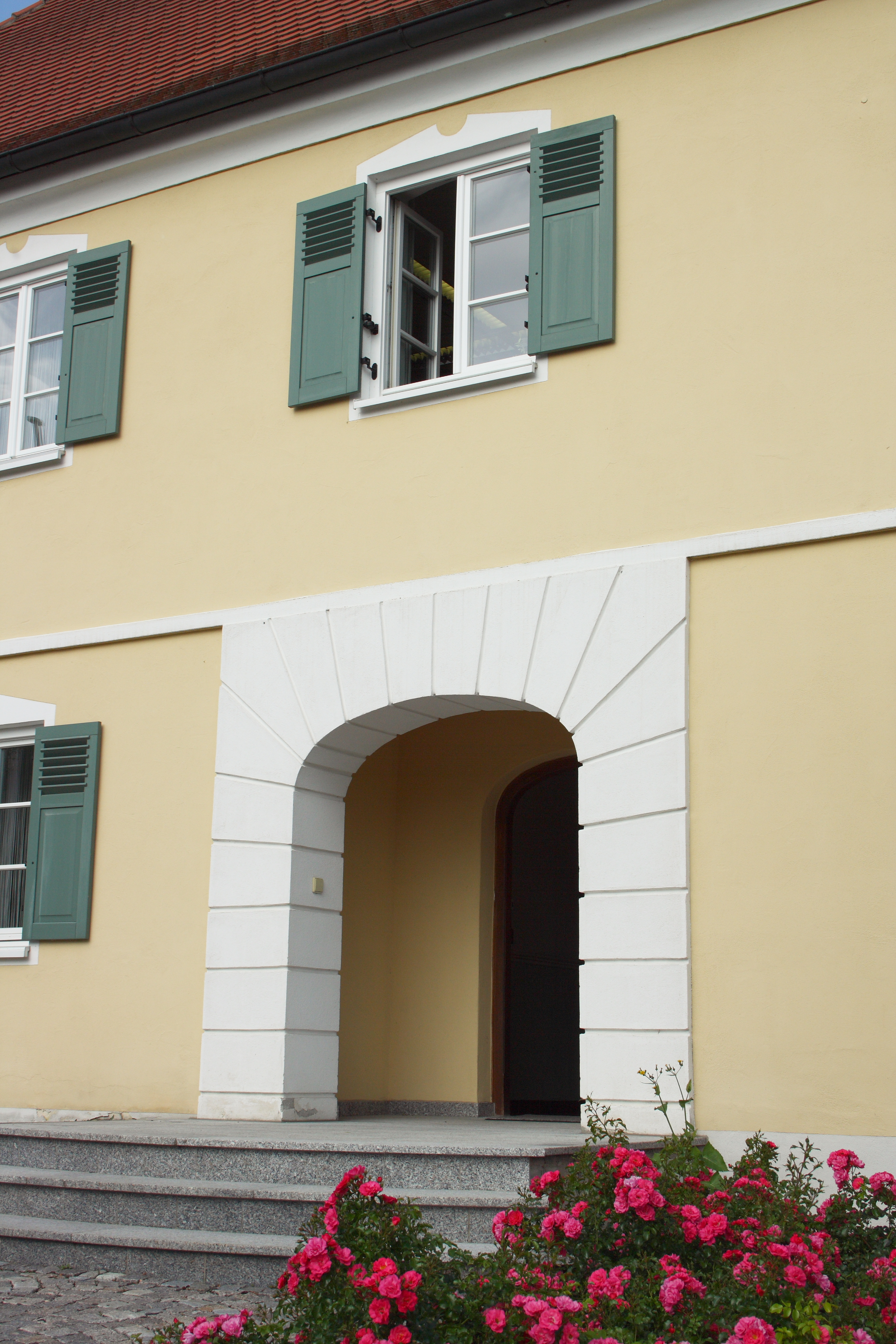 ehemaliges Pflegamt in Weisingen, einem Ortsteil von Holzheim im Landkreis Dillingen an der Donau, Hochstiftstraße 2